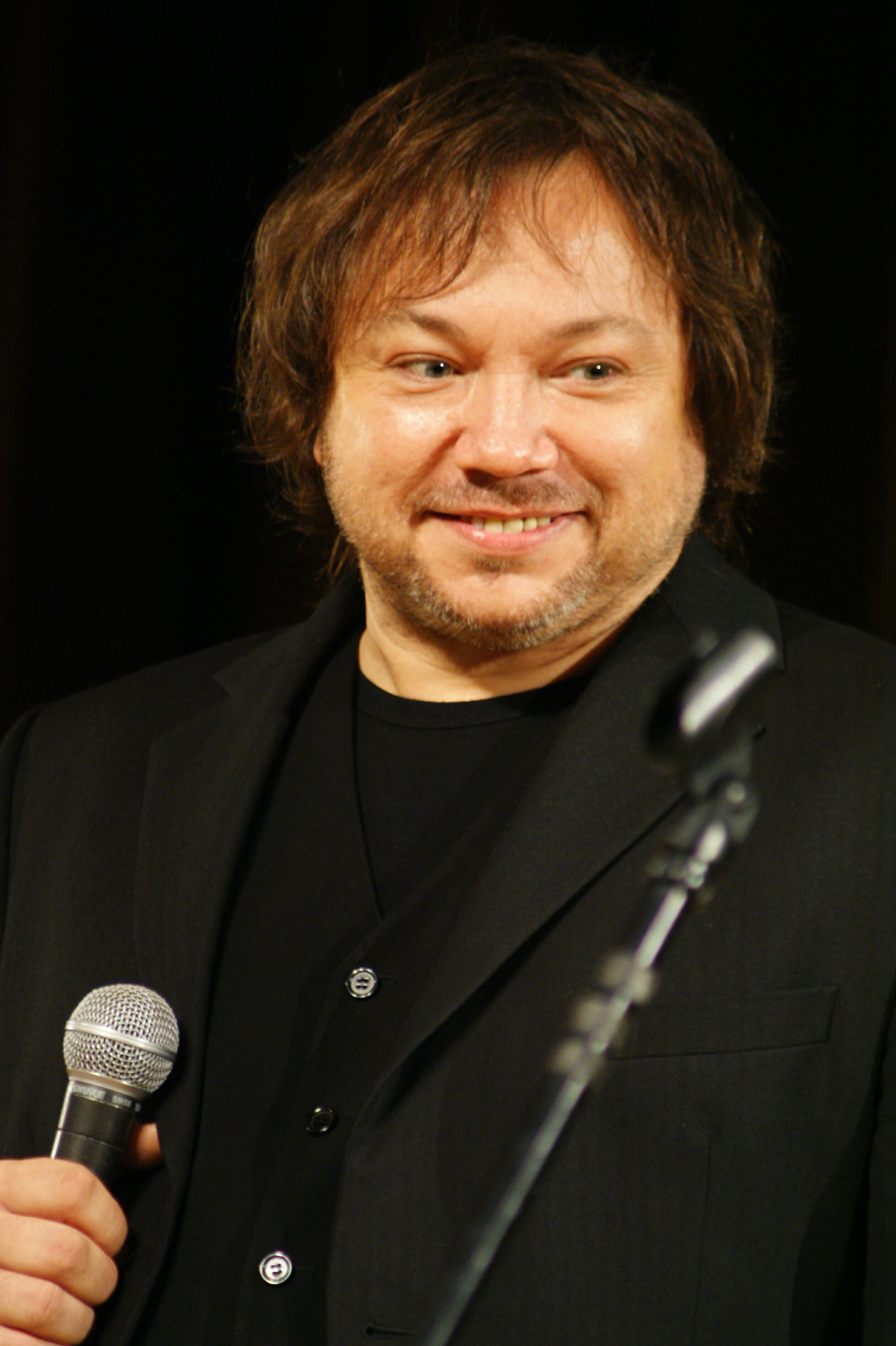 Mieczysław Szcześniak.